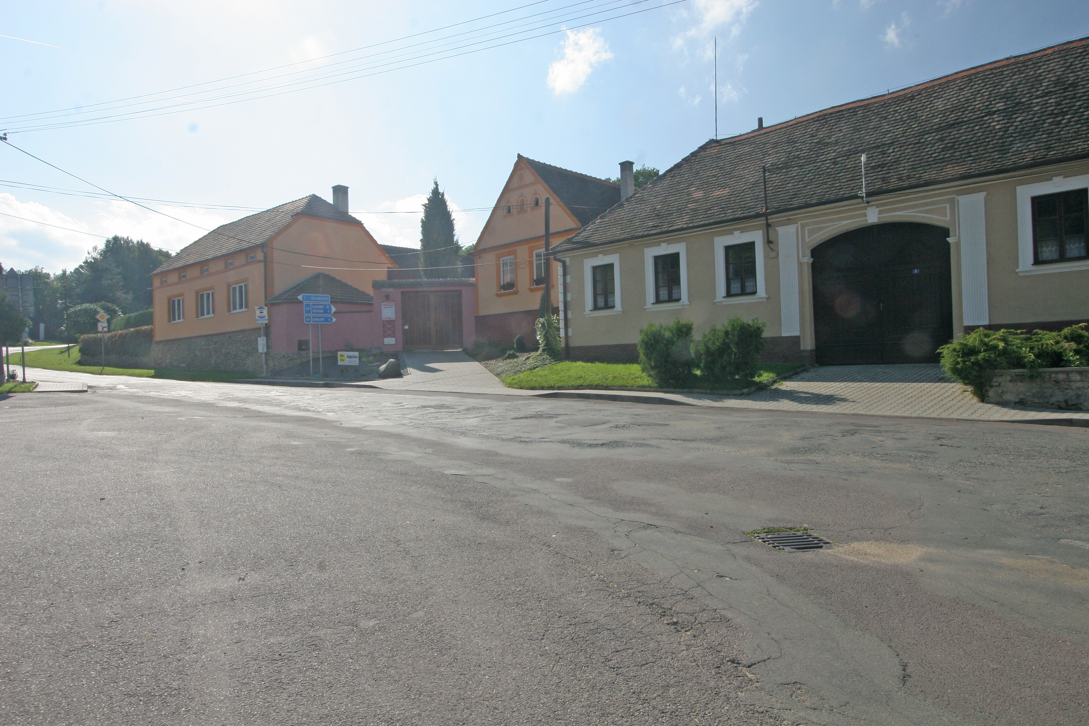 Vysočany čp, 6